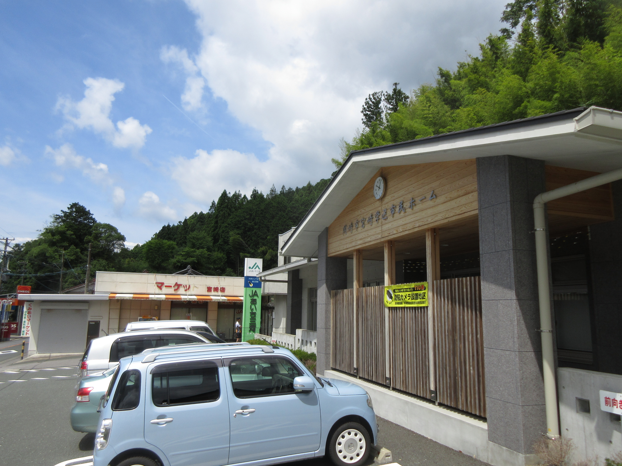 宮崎学区市民ホーム（岡崎市宮崎町）